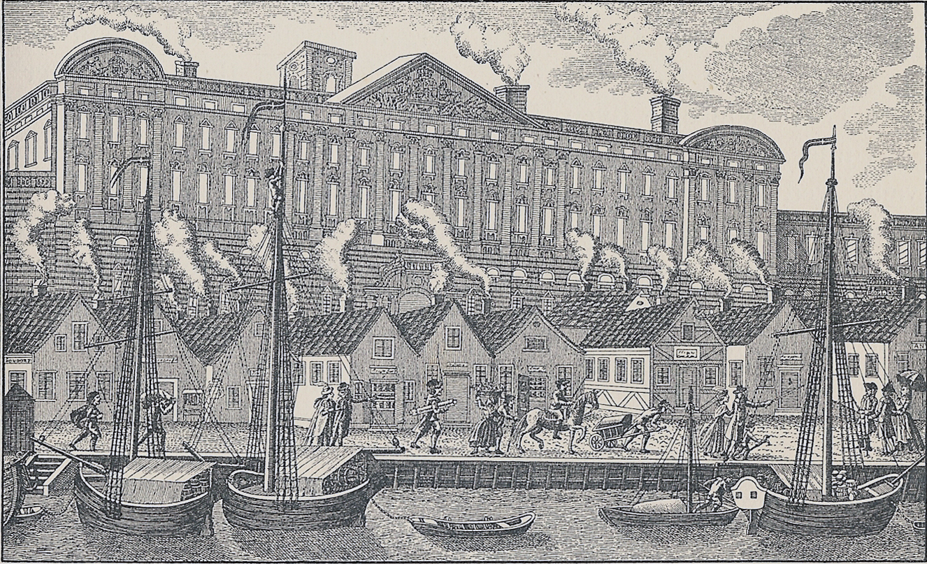 Den såkaldte Frederikskoloni af hjemløse familier på den nedbrændte Christiansborgs Slotsplads efter branden i København 1795.